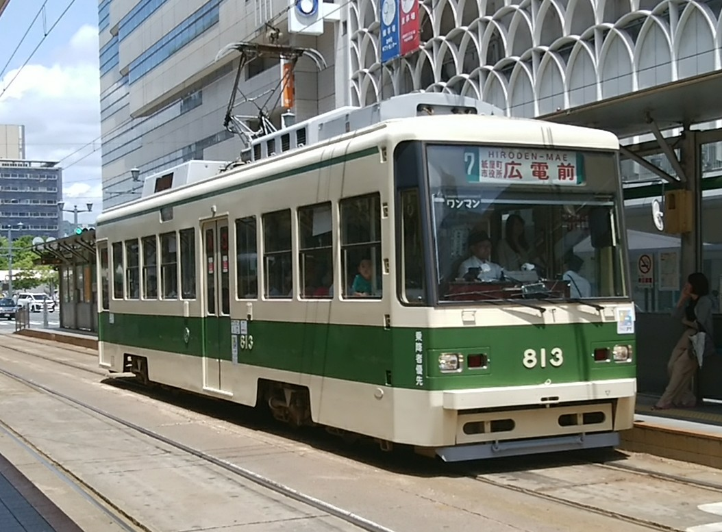 7号線を走っている広電813号